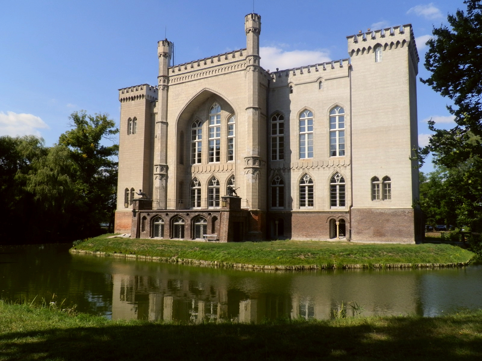 Zamek w Kórniku – zabytkowa rezydencja historycznych rodów Górków i Działyńskich, położona w mieście Kórnik, w województwie wielkopolskim. Obecnie siedziba muzeum i Biblioteki Kórnickiej PAN. Źródło